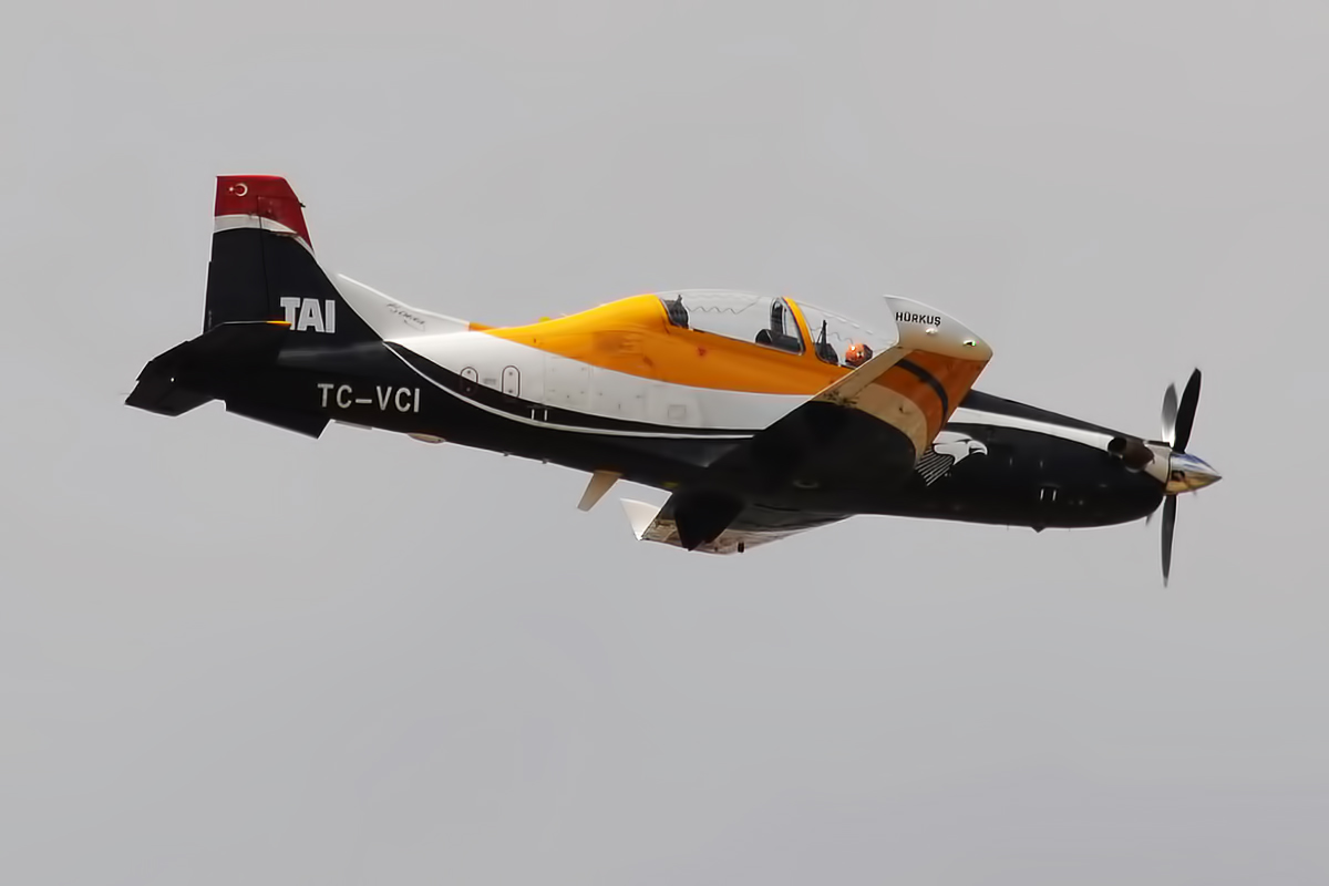 TAI, TC-VCI, TAI-HURKUS-B